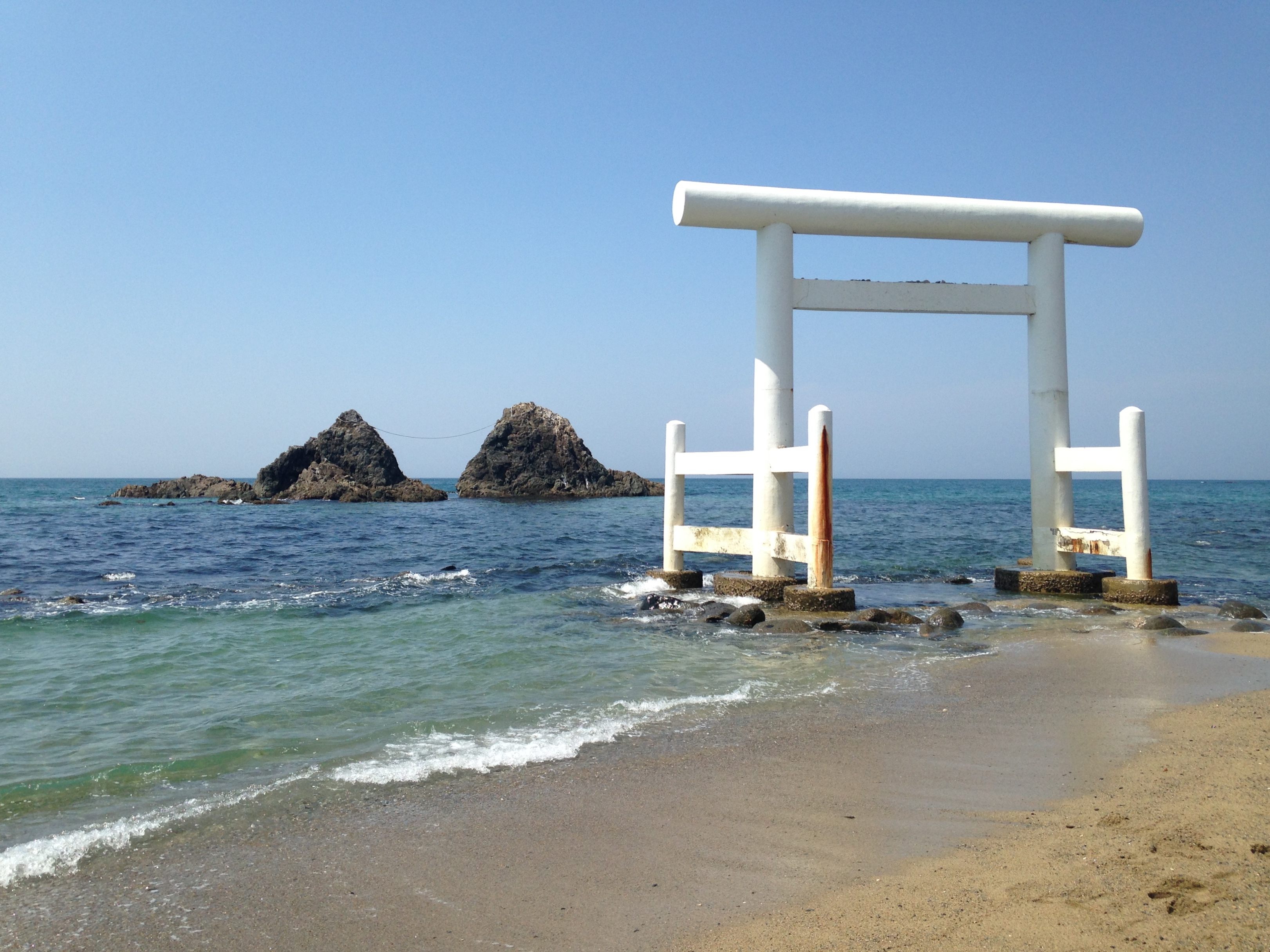 二見ヶ浦の夫婦岩と白い鳥居